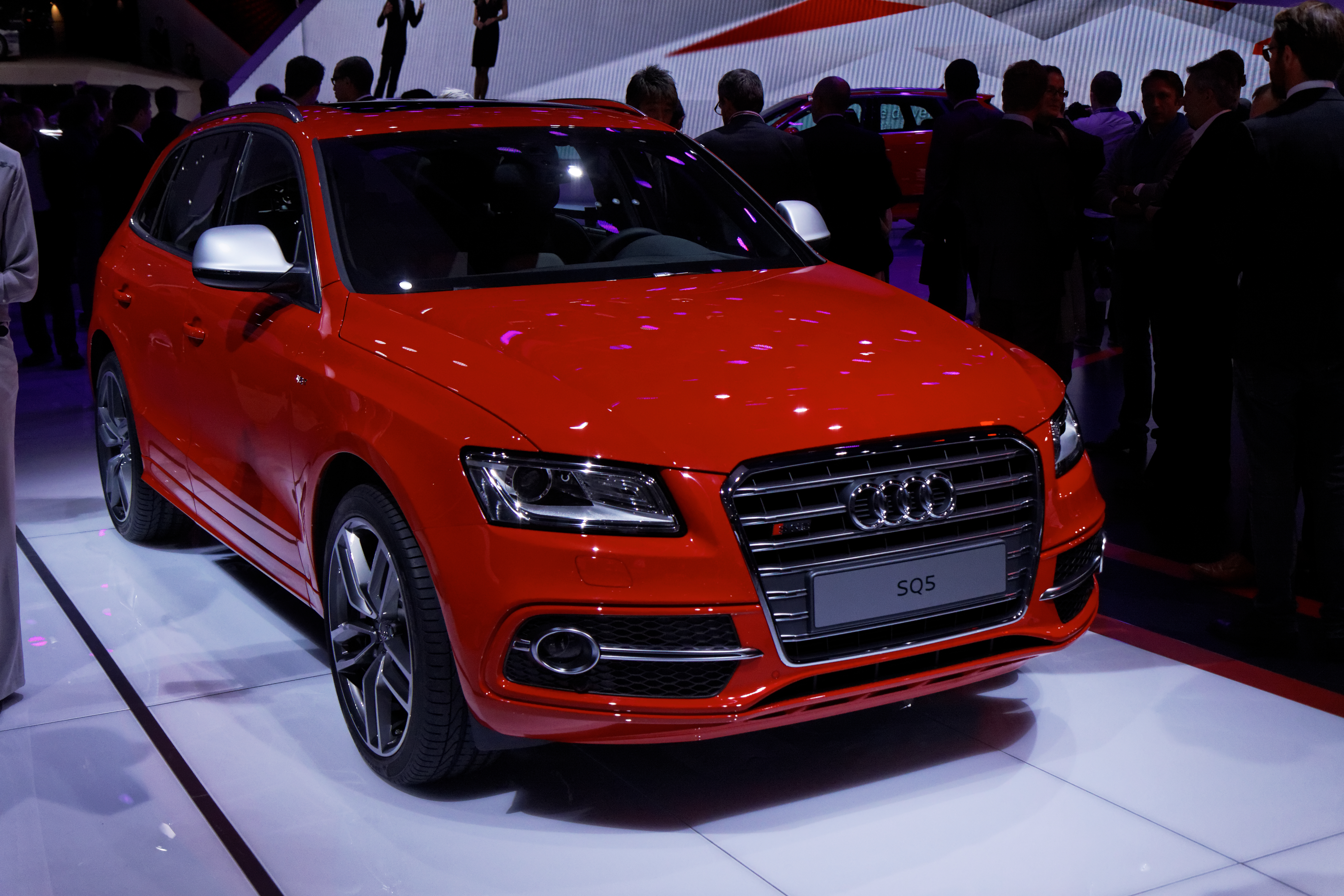 Une Audi SQ5 présentée lors du Mondial de l'Automobile de Paris 2012.